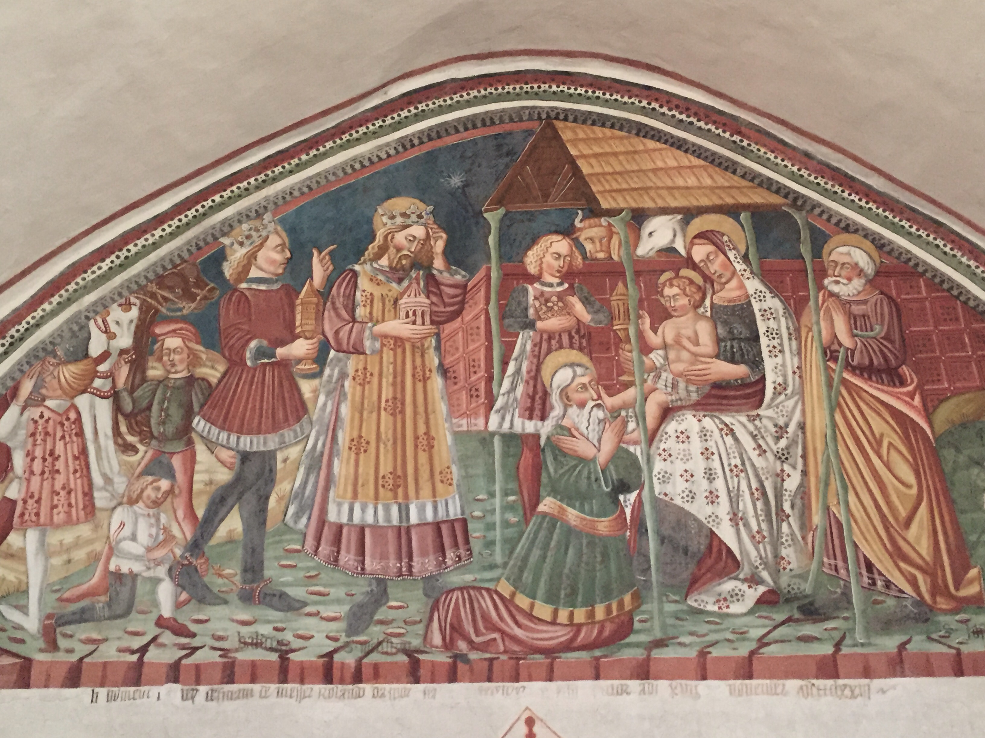 interno Castel Valer